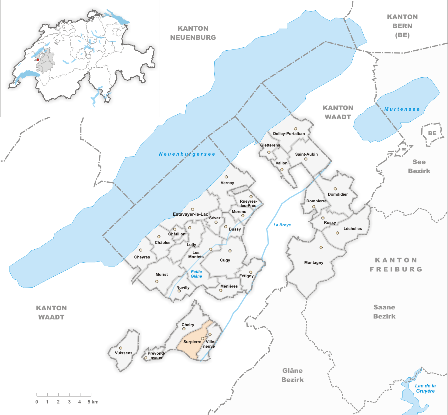 Municipality Surpierre